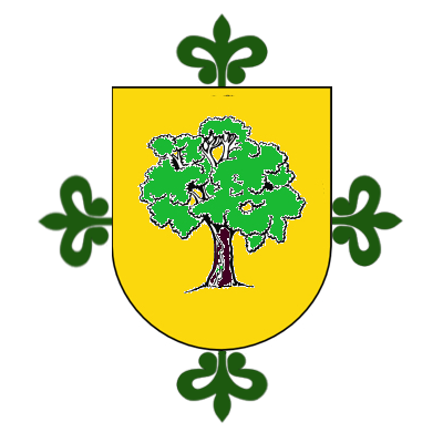 Armas de Sureda sobre cruz de Alcántara